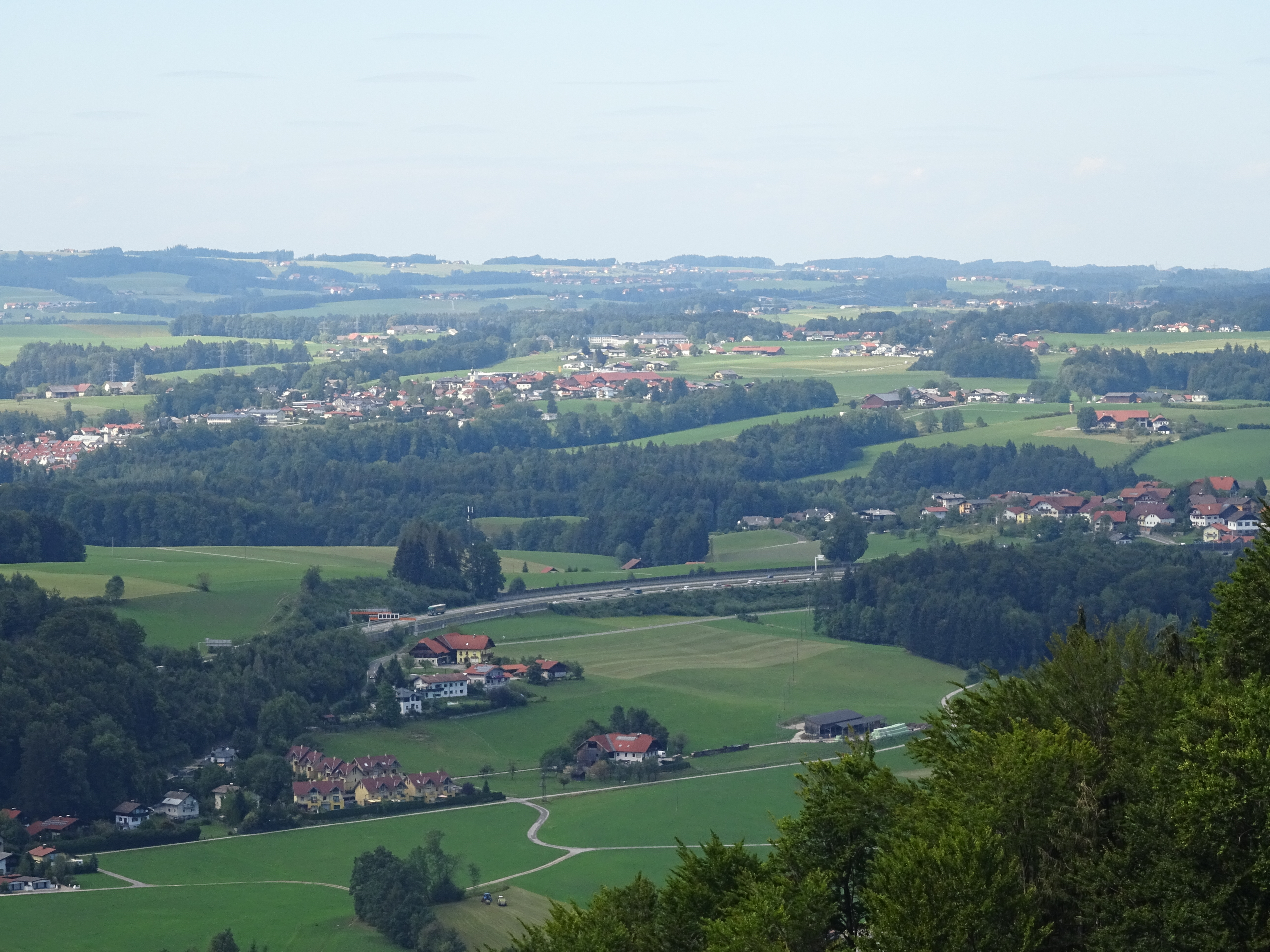 Ausblick von einem Aussichtspunkt auf dem Heuberg in ca. 600 m Seehöhe nach Nordwesten - in den Flachgau. Zu sehen ist ein Teil des Gebiets rund um Hallwang und Elixhausen.